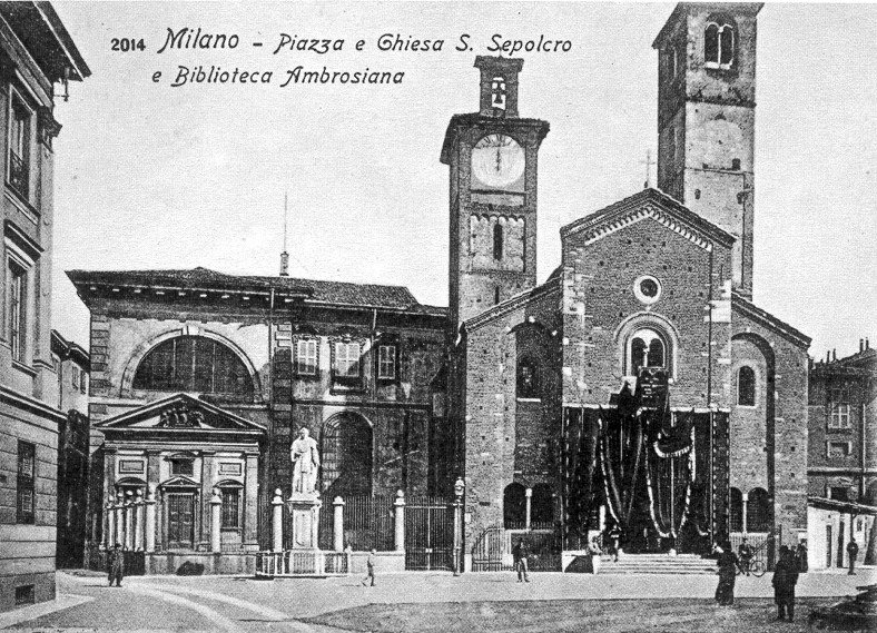 Milano, la Chiesa di San Sepolcro (con la vecchia facciata storicista). La fotografia è databile fra il 1897 (anno di rifacimento della facciata) e il 1903 (anno dil restauro del campanile di destra)